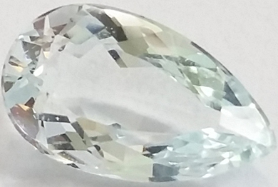 Facettierter Goshenit (farbloser Beryll)